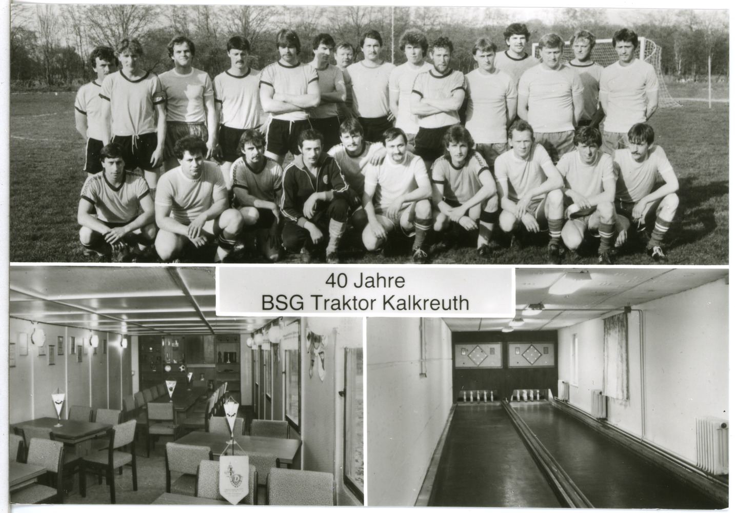 Kalkreuth; 40 Jahre BSG Traktor This postcard is from publisher Brück & Sohn in Meißen ( postcard has a unique number 30701 and is available in a higher resolution at the publisher. This images was uploaded in a cooperation project between Wikipedians and the publisher.